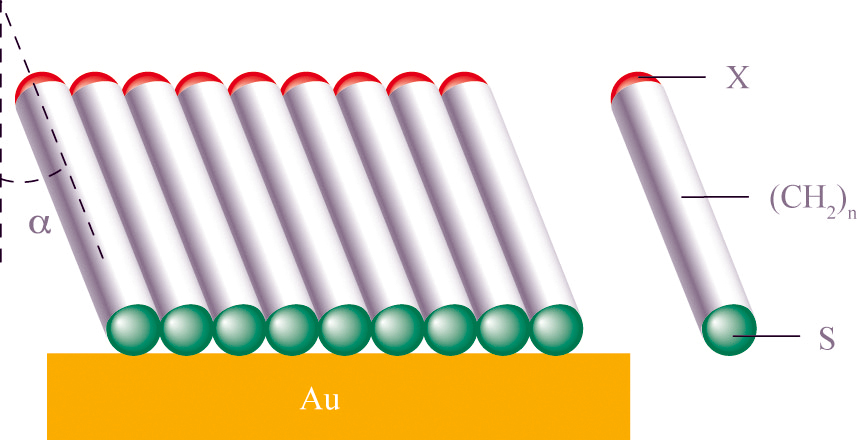 Самособирающийся монослой алкантиола CnH2n+1SH на поверхности золота.